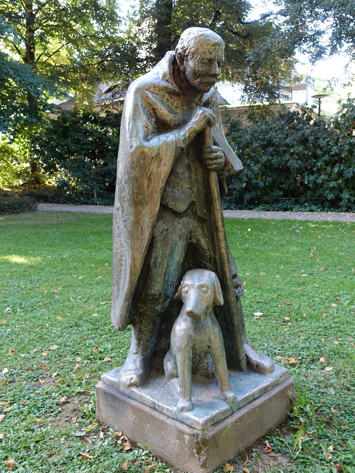 Skulptur, Schäfer mit Hund, Wettsteinpark, Riehen von Otto Roos (1887–1945) Bildhauer, Maler und Zeichner